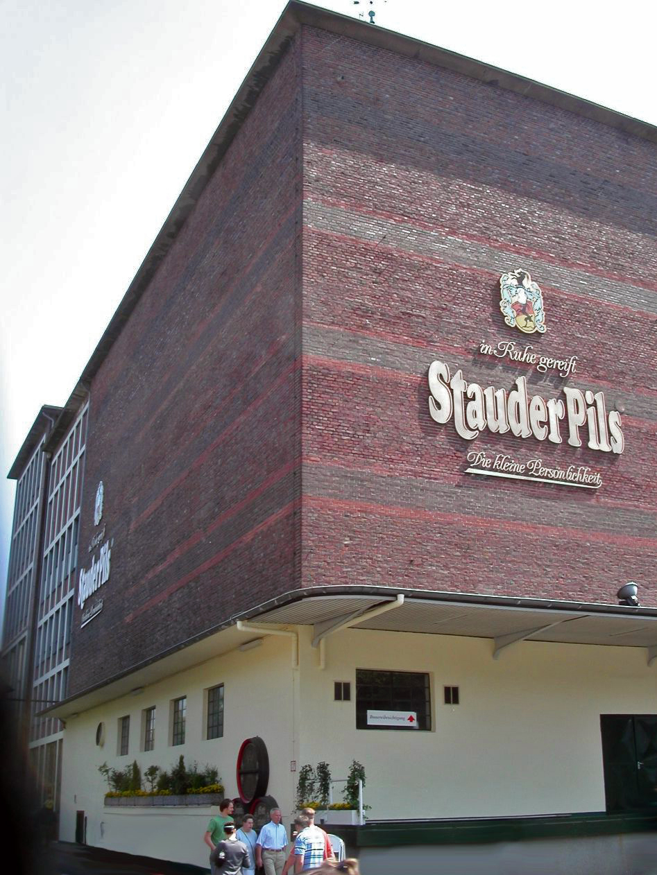 Gebäude der Stauderbrauerei in Essen